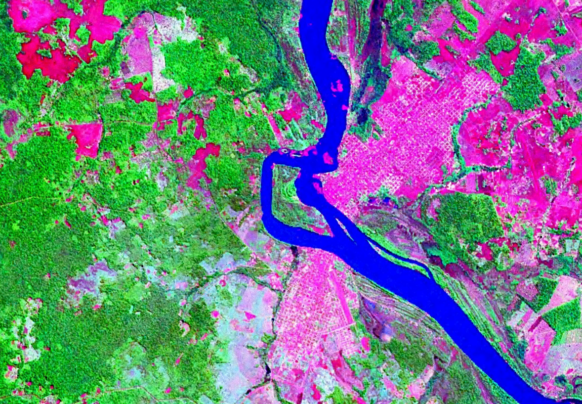 Vista satelital de la Isla Suárez o Gujara-mirim situda en el río Mamoré entre Bolivia y Brasil